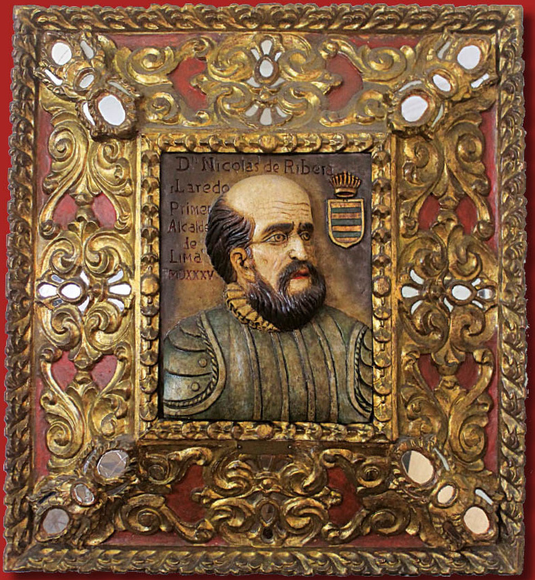 Nicolás de Ribera, natural de Olvera (provincia de Cádiz, España), fue el primer alcalde de Lima, Perú.